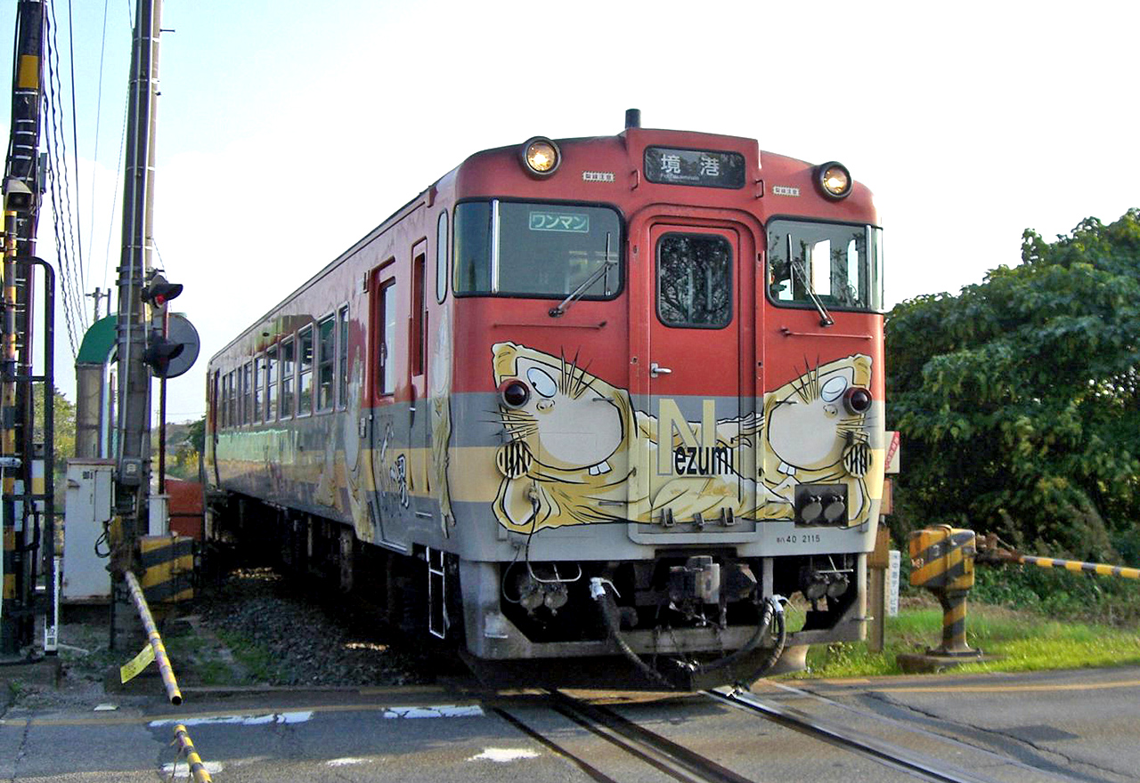 JR西日本キハ40形2115 御崎口駅（現・大篠津町駅）にて。